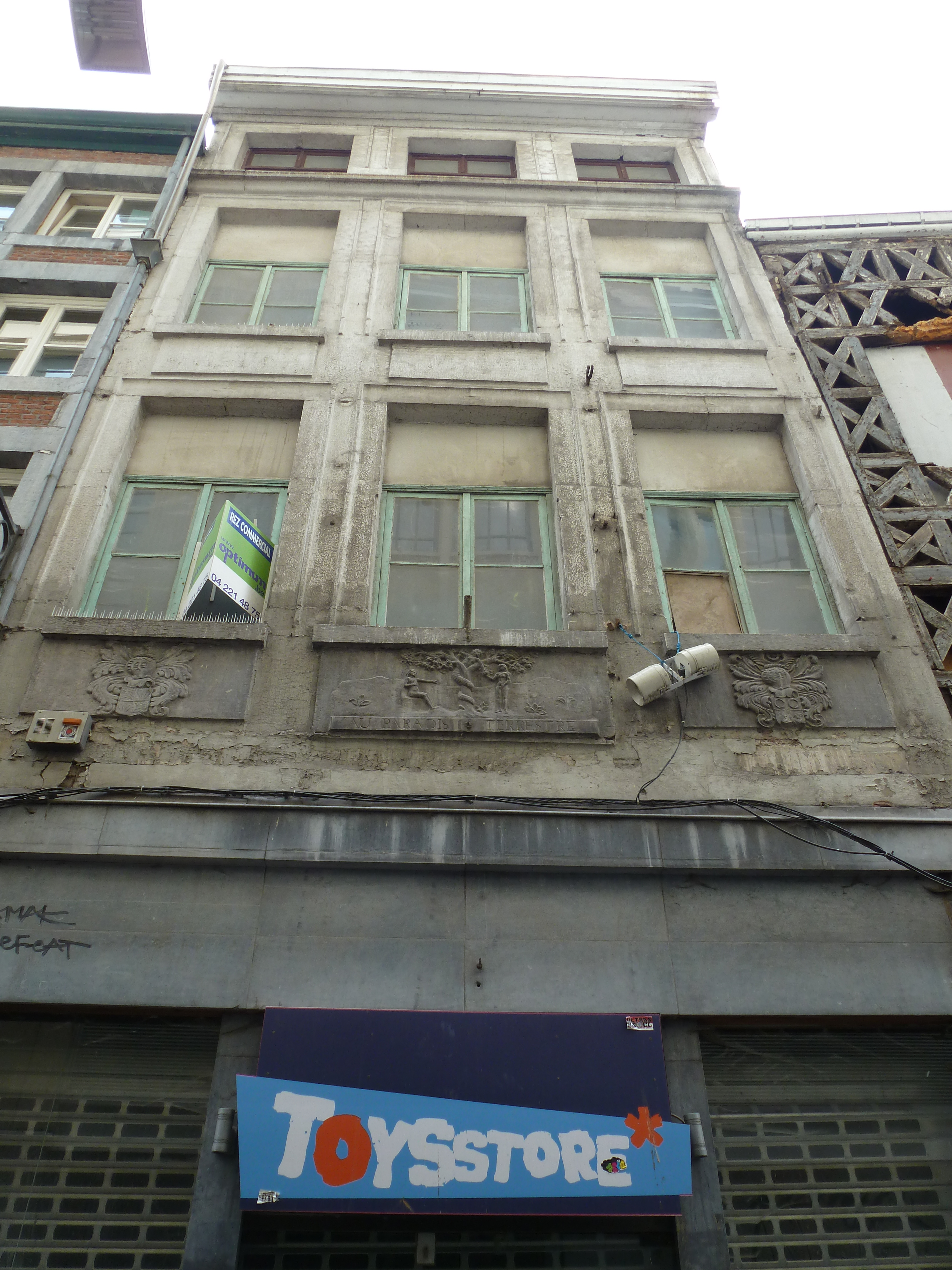 maison ancienne